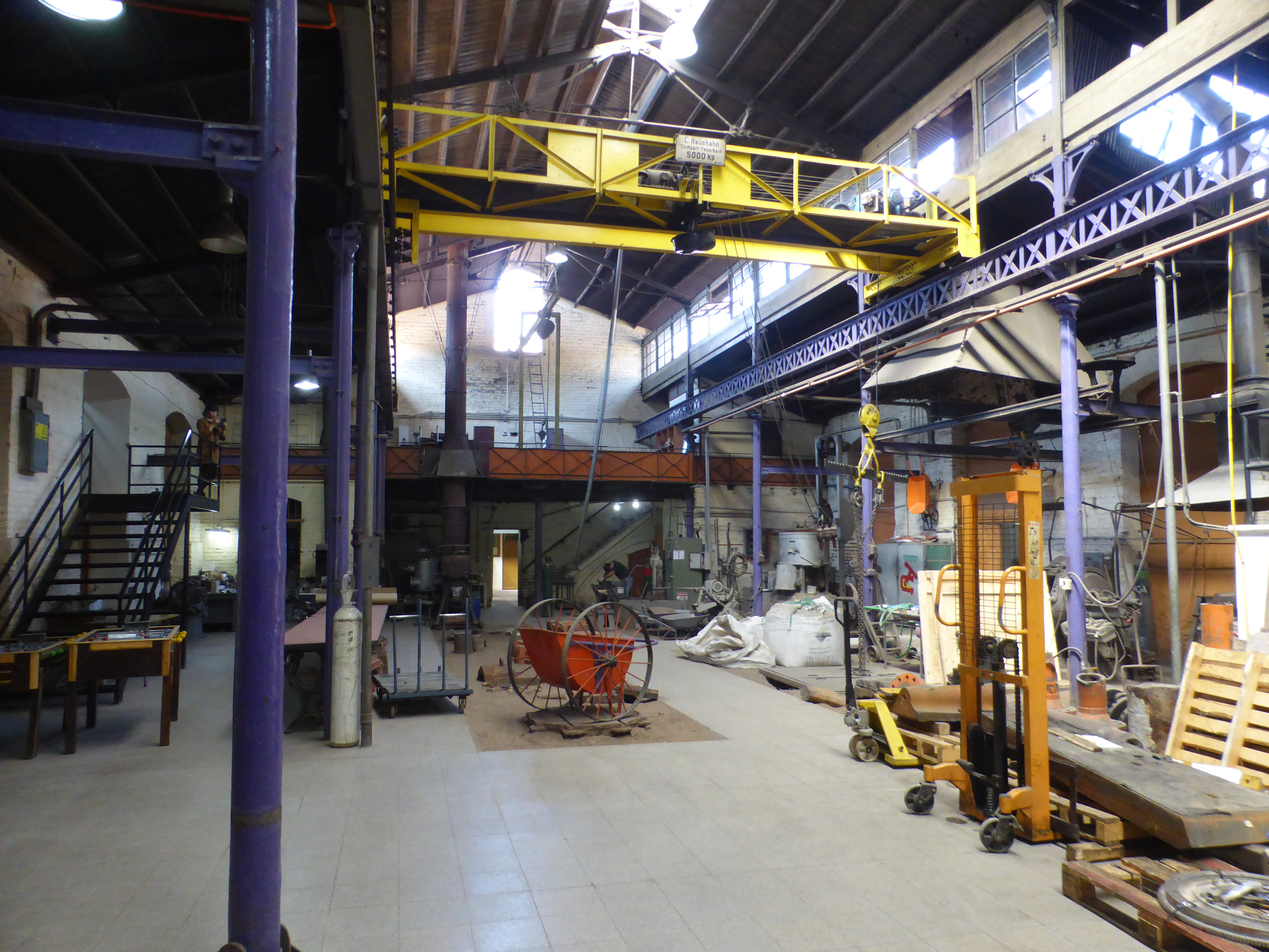 Antiguos talleres, todavía en uso, de la EAO (Escuela de Artes y Oficios), actualmente "Universidad de Santiago de Chile" (Usach).